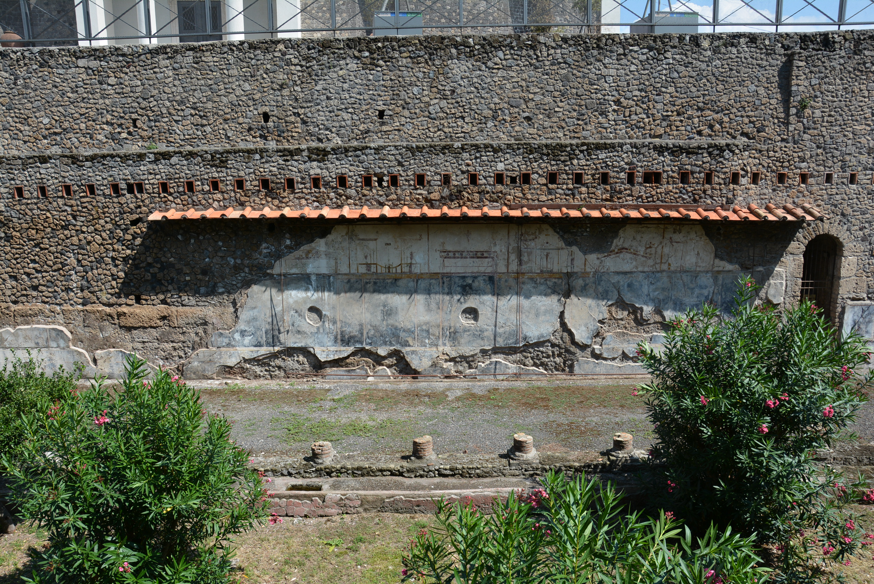 Villa Imperiale - MIBACT This is a photo of a monument which is part of cultural heritage of Italy.